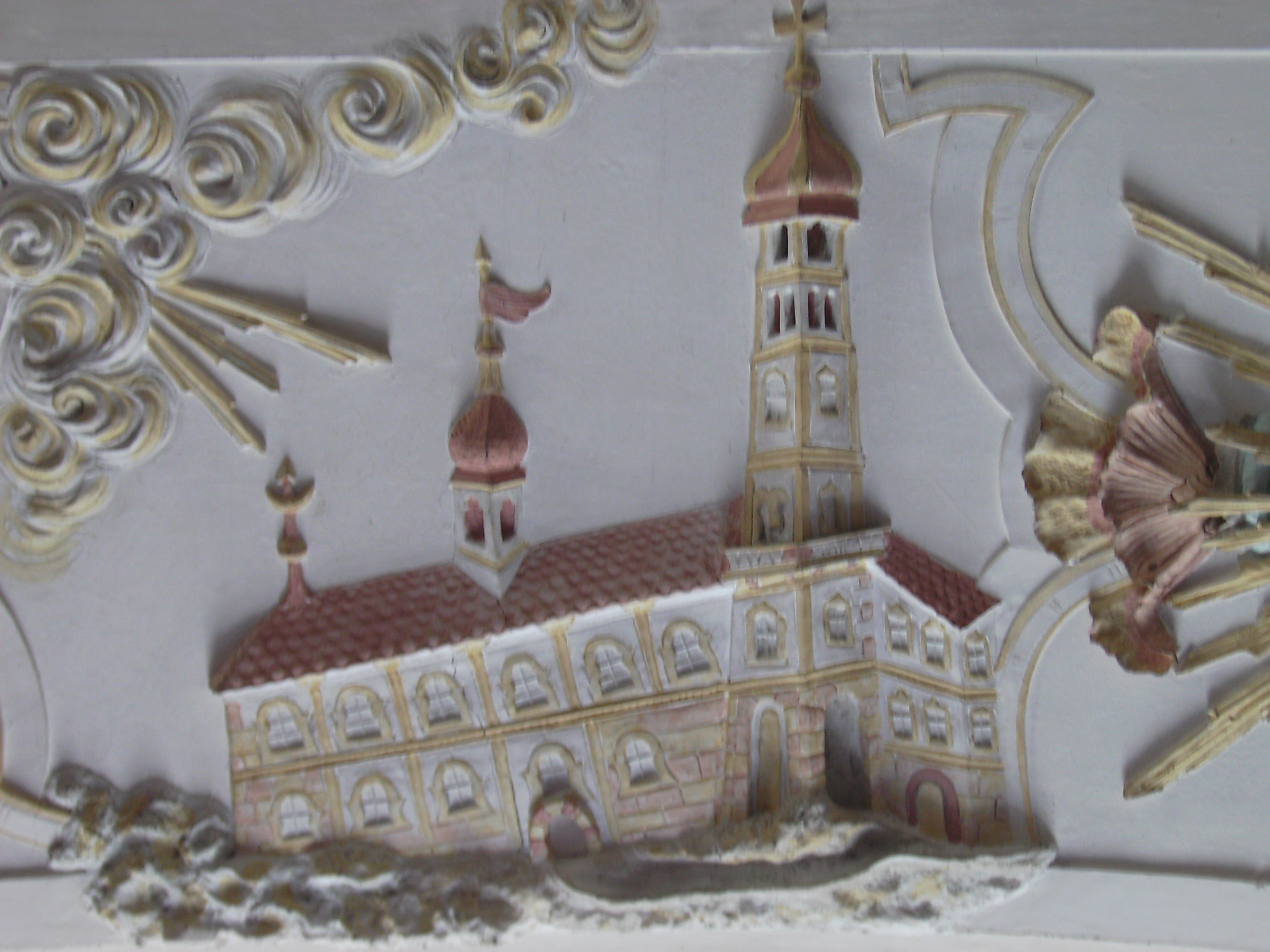 Ossiach (Stiftskirche): Stuckrelief (Wessobrunner Schule) mit Abbildung der Stiftskirche (barock, ca. 1740)